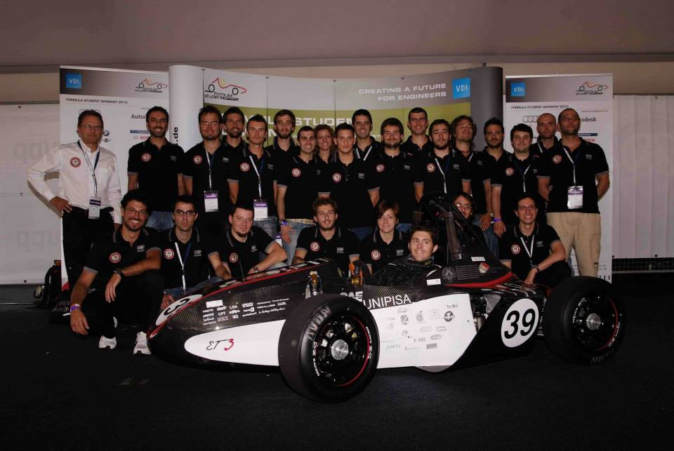 ETeamFSGermany2010